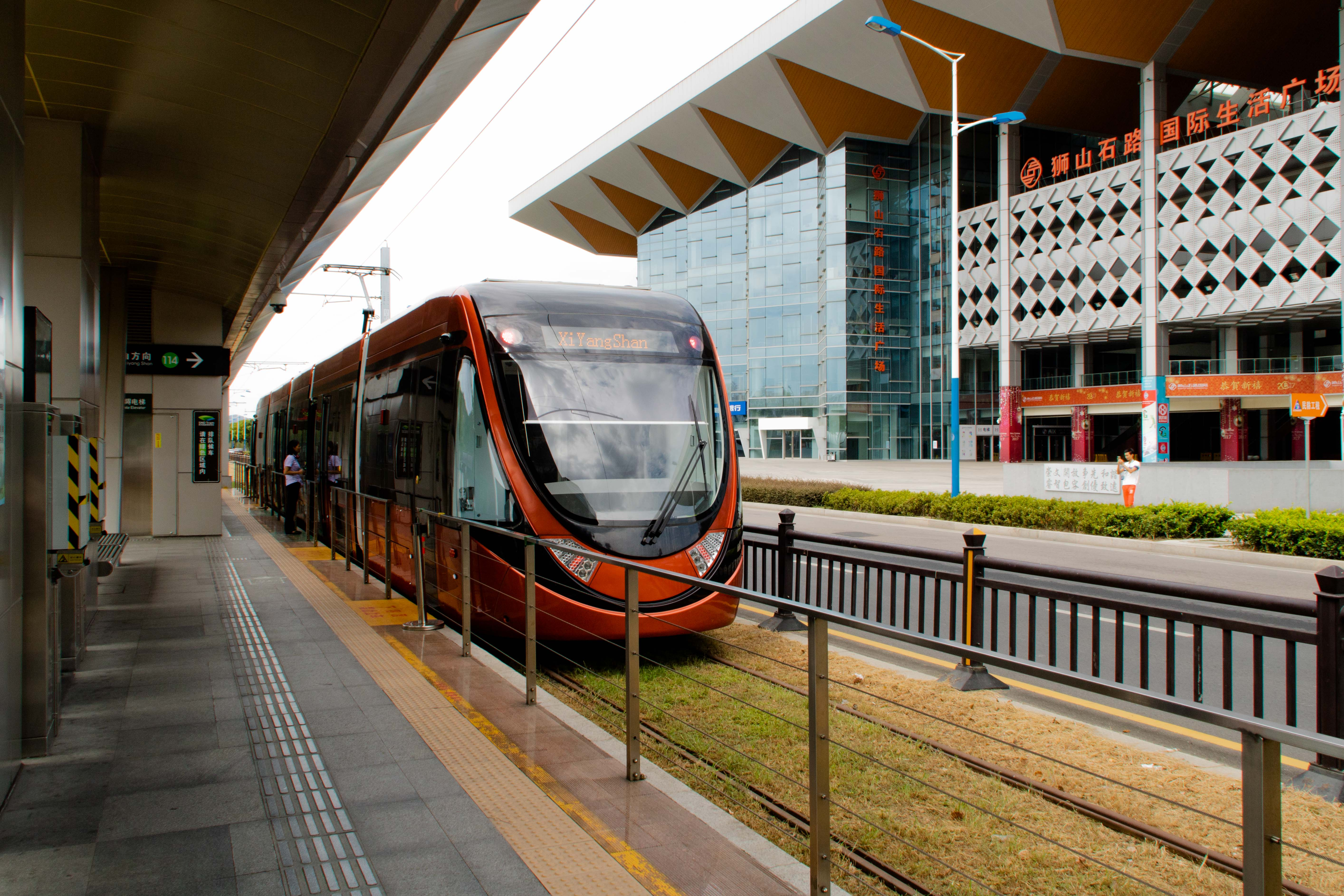 中文（中国大陆）: 停靠在苏州乐园站的有轨电车